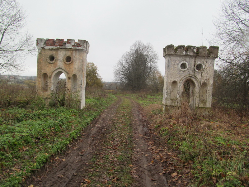 Гняздзілава. Уязная брама